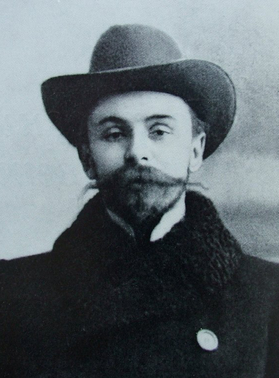 Александр Николаевич Скрябин (фото 1903 г.)